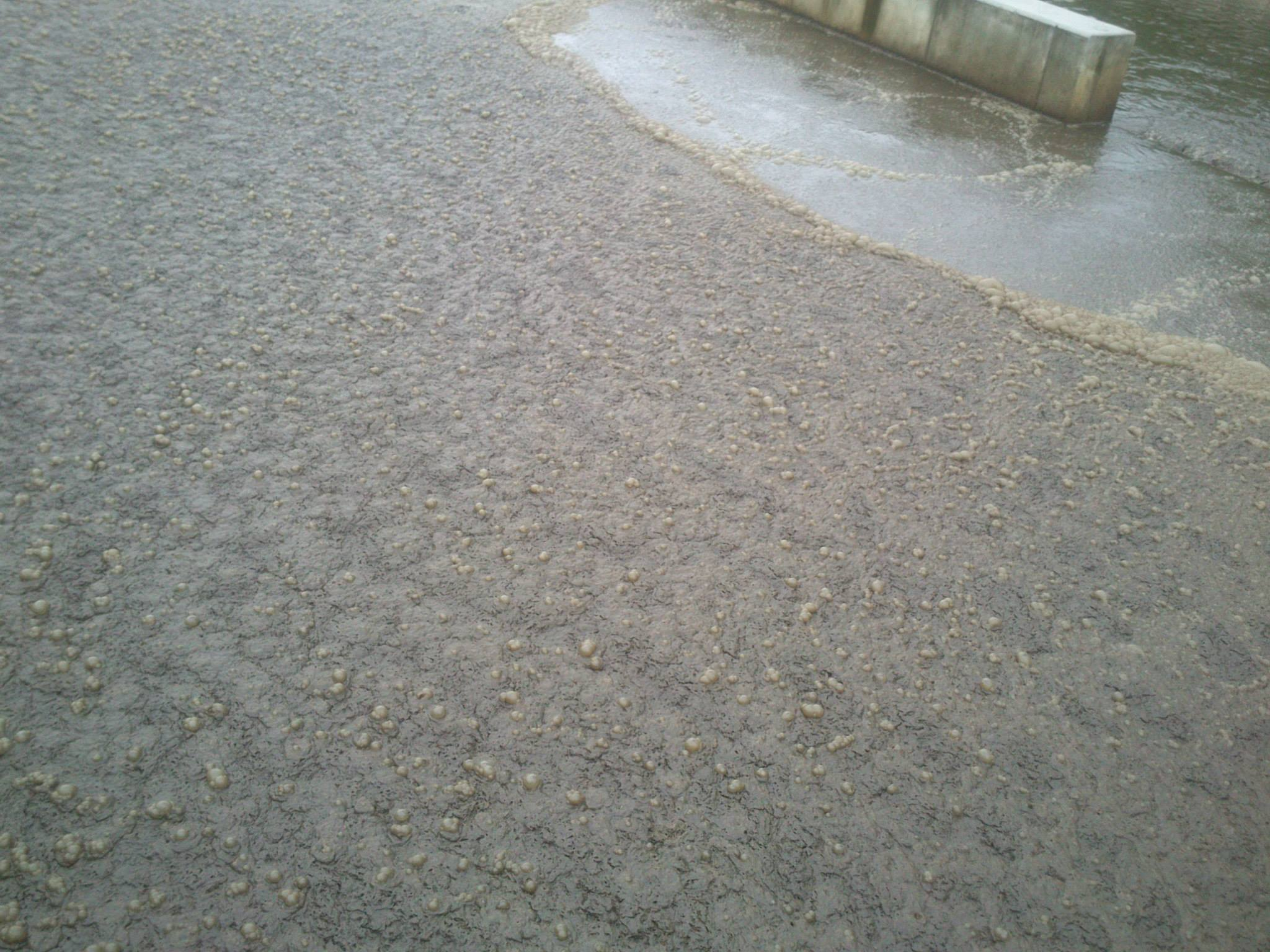 Biologická fáze čištění vody v čističce odpadních vod